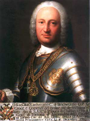 Ritratto del tenente generale Giovanni Battista Cacherano di Bricherasio.